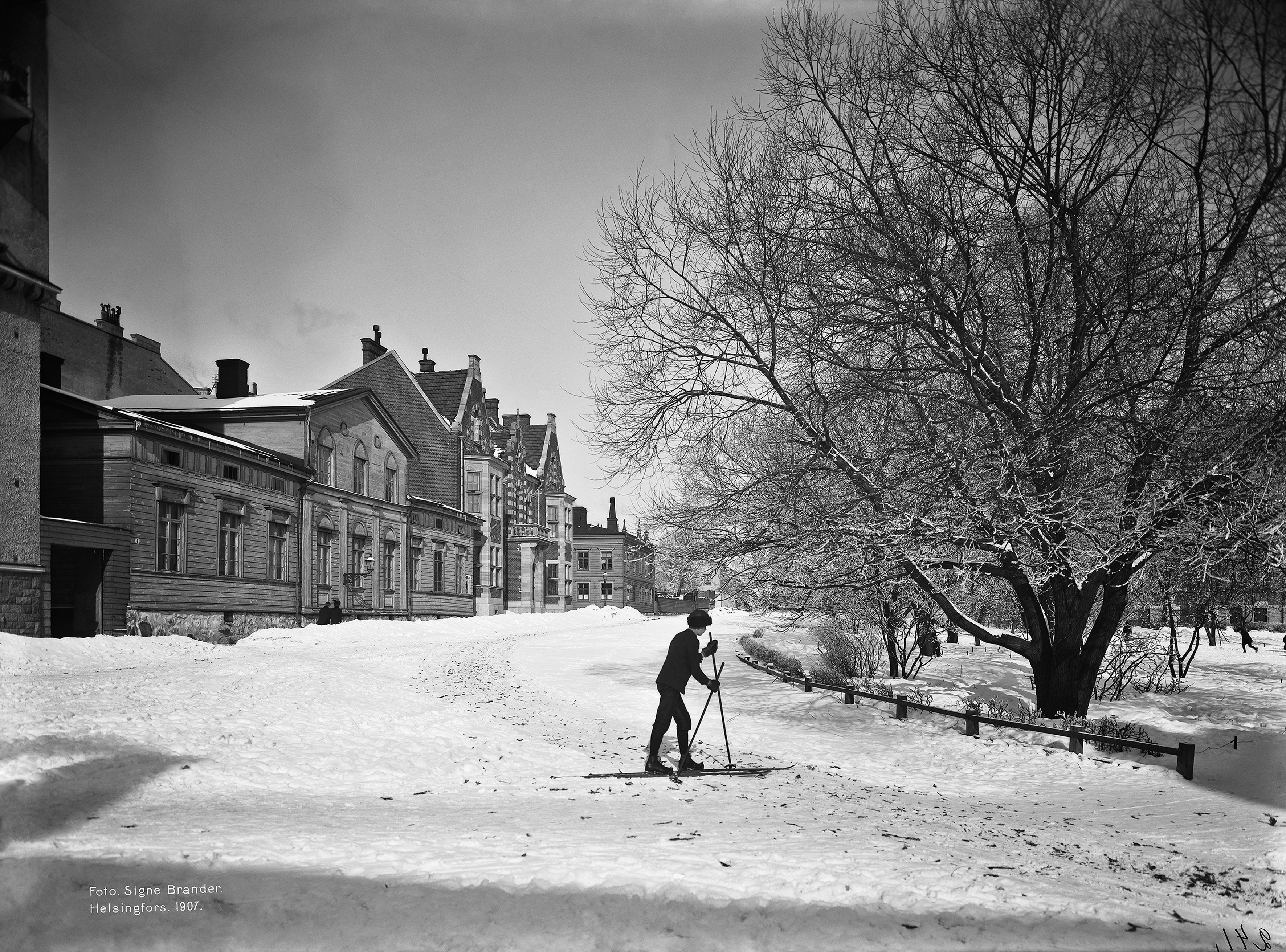 Maurinkatu 4, 6, 8. Liisanpuistikko oikealla.; negatiivi ja vedos, lasi paperi pahvi, mv